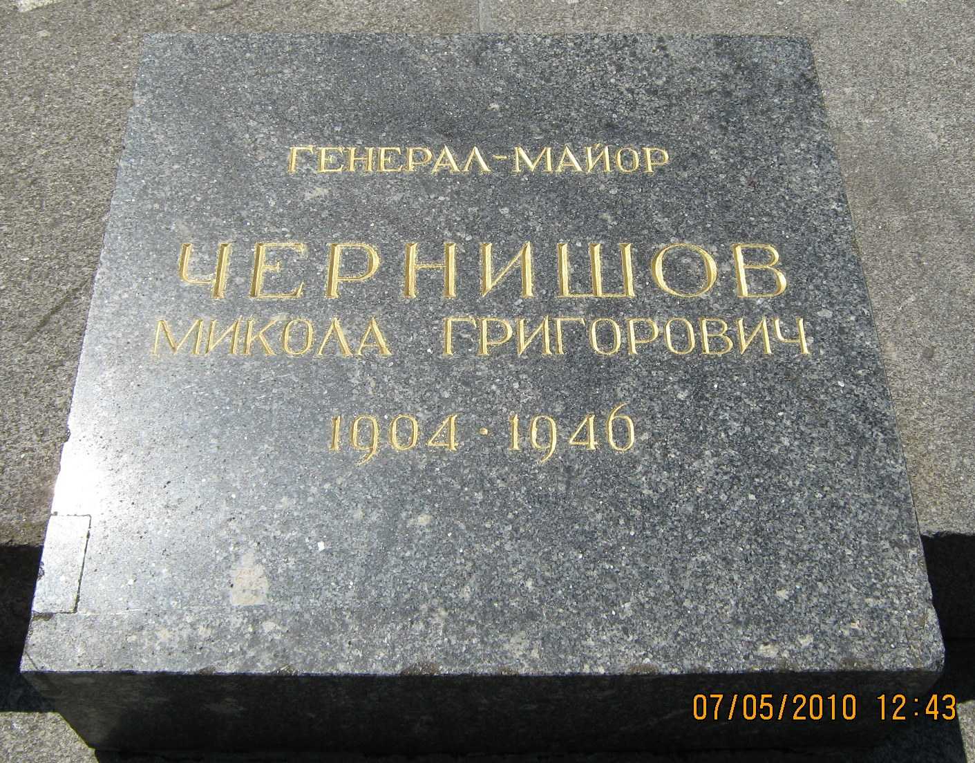 Меморіал Вічної Слави.